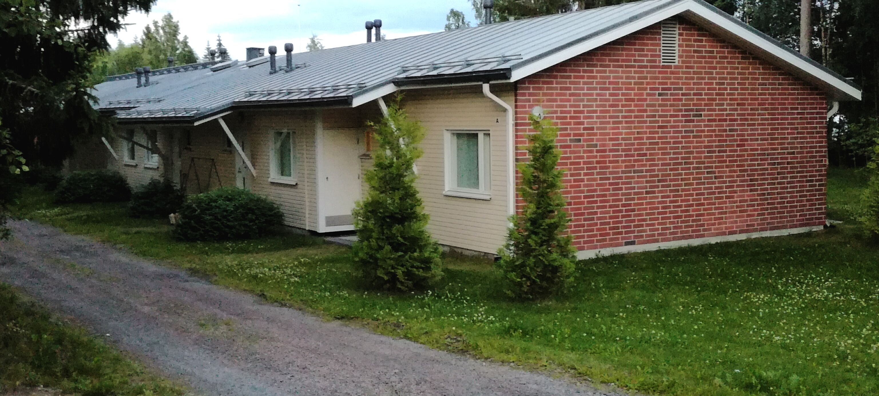 Rivitalo Vihtavuoressa Laukaassa